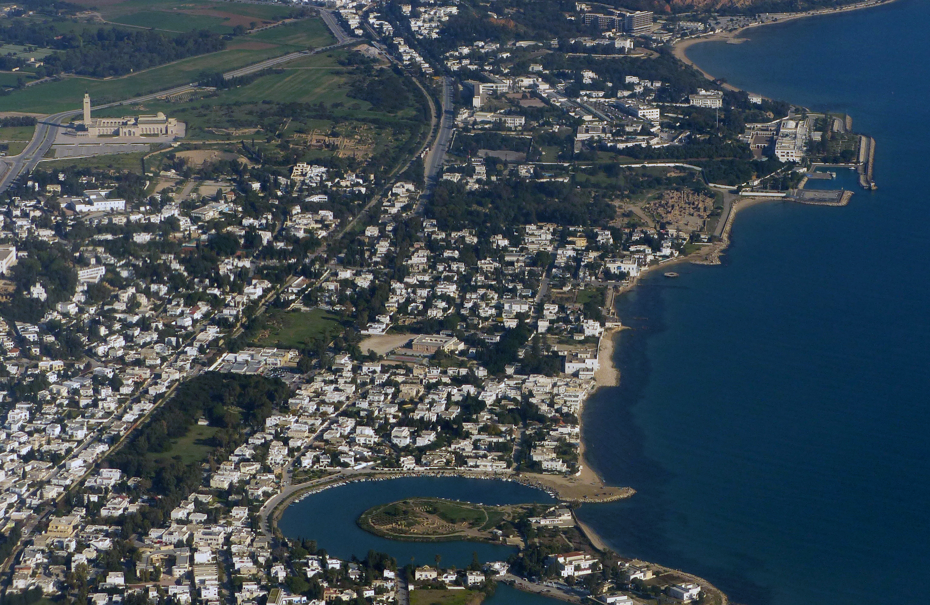 Vue aérienne de la ville de Carthage dans la banlieue nord de Tunis. On distingue en bas de la photo, les ports puniques. En haut à droite, on voit le palais présidentiel avec son port sur la mer. Entourant le palais de part et d'autre, on remarquera le site archéologique de Carthage. En haut à gauche on voit la mosquée Malik Ibn Anes. A coté de la mosquée, on distingue le célèbre théâtre romain, où a lieu, chaque été, le festival de Carthage